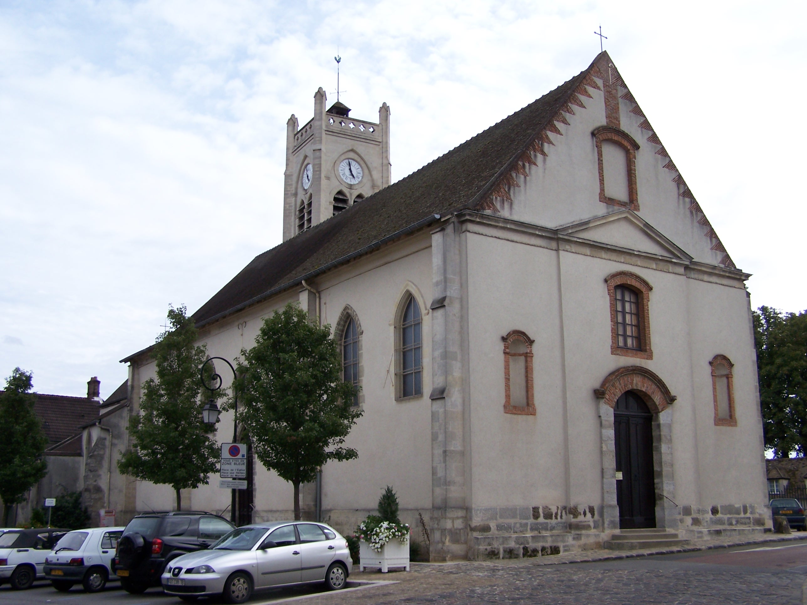 Église de Neauphle-le-Château (Yvelines, France). Photo personnelle. Church of Neauphle-le-Château (Yvelines, France). Personal photo. Auteur/Author : ℍenry Salomé